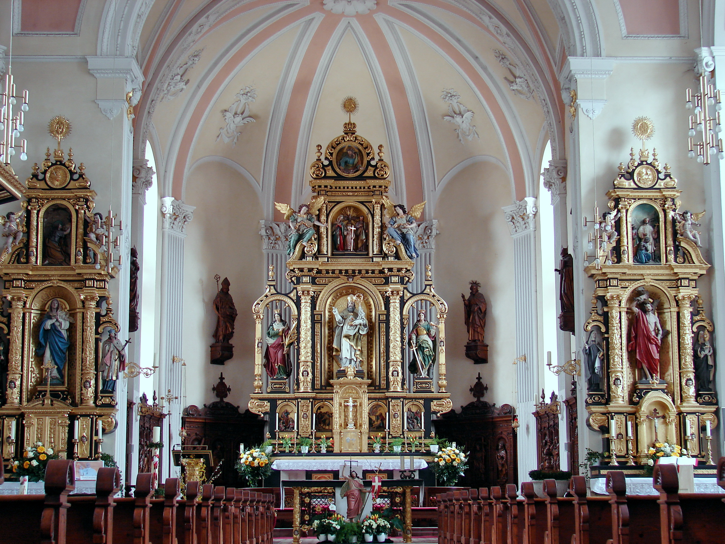 Der Hochaltar sowie die beiden Seitenaltäre enthalten aufwändige Ornamentschnitzereien und reiche Vergoldungen. Besonders wertvolle Schnitzarbeiten sind die Apostelfiguren im Altarhaus sowie die Tableaus links und rechts des Altars. Sie wurden von dem Elsner-Schüler Thomas Buscher ausgeführt, der sich später als Bildhauer selbständig machte. Altäre, Tabernakel und die stilgleiche Kanzel sind reich mit Skulpturen und Reliefs geschmückt.